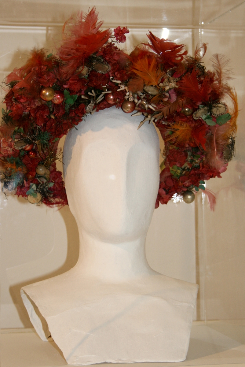 snimljeno tijekom Noći muzeja u Etnografskom muzeju u Zagrebu